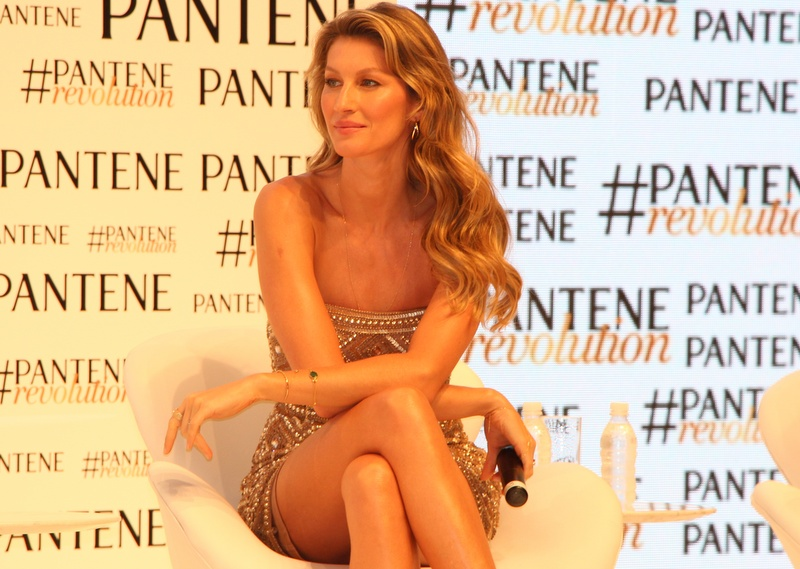 Gisele Bundchen-006